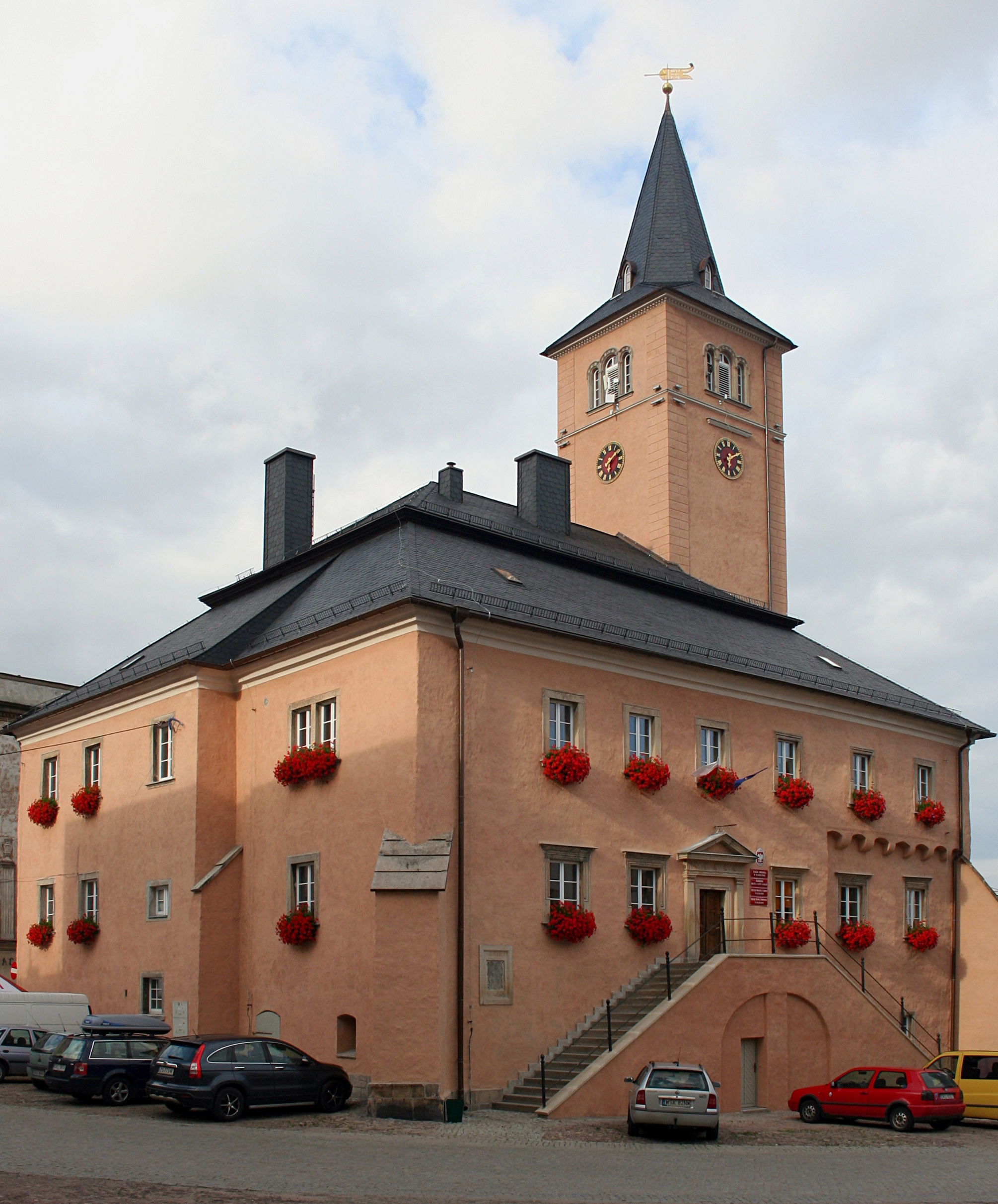 Ratusz w Radkowie, powiat kłodzki